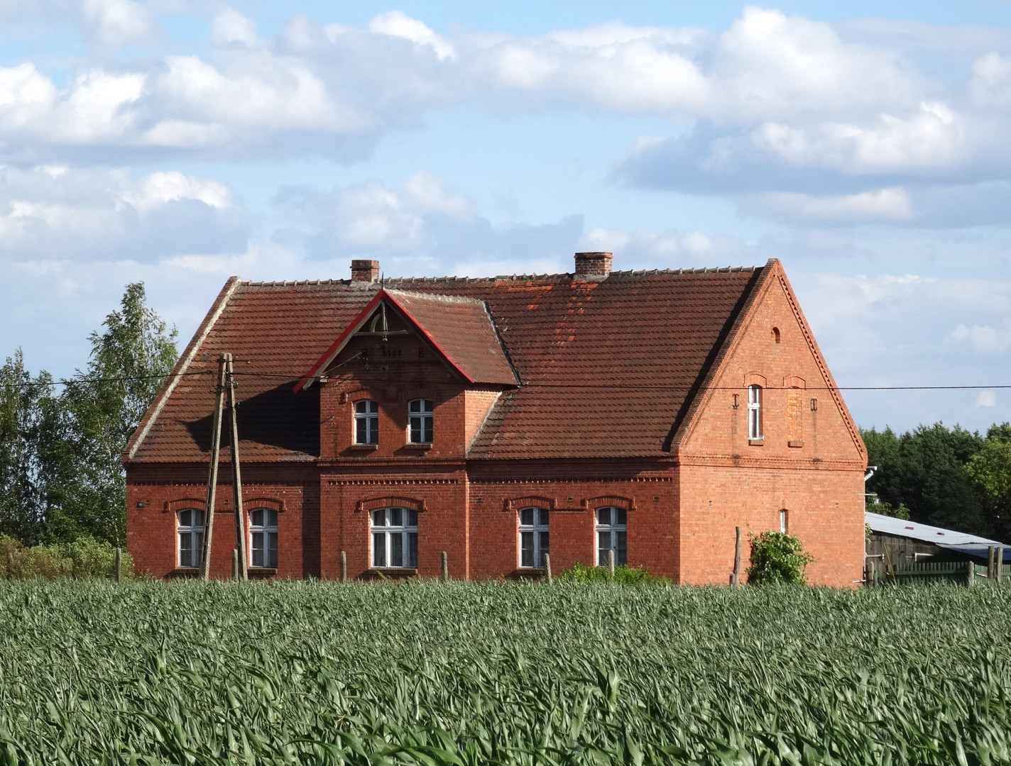 Wieś Dąbrowa Wielka, gmina Nowa Wieś Wielka, powiat bydgoski